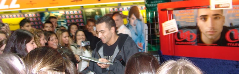 Singer Muhabbet in Berlin